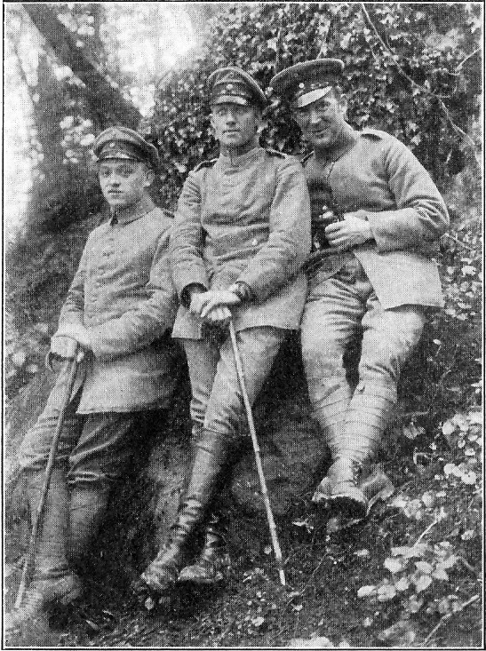 Oberjäger Haacke (2. Bataillons-Schreiber), Oberjäger Hampe, Jäger Krupa-Krupinski (Maler)